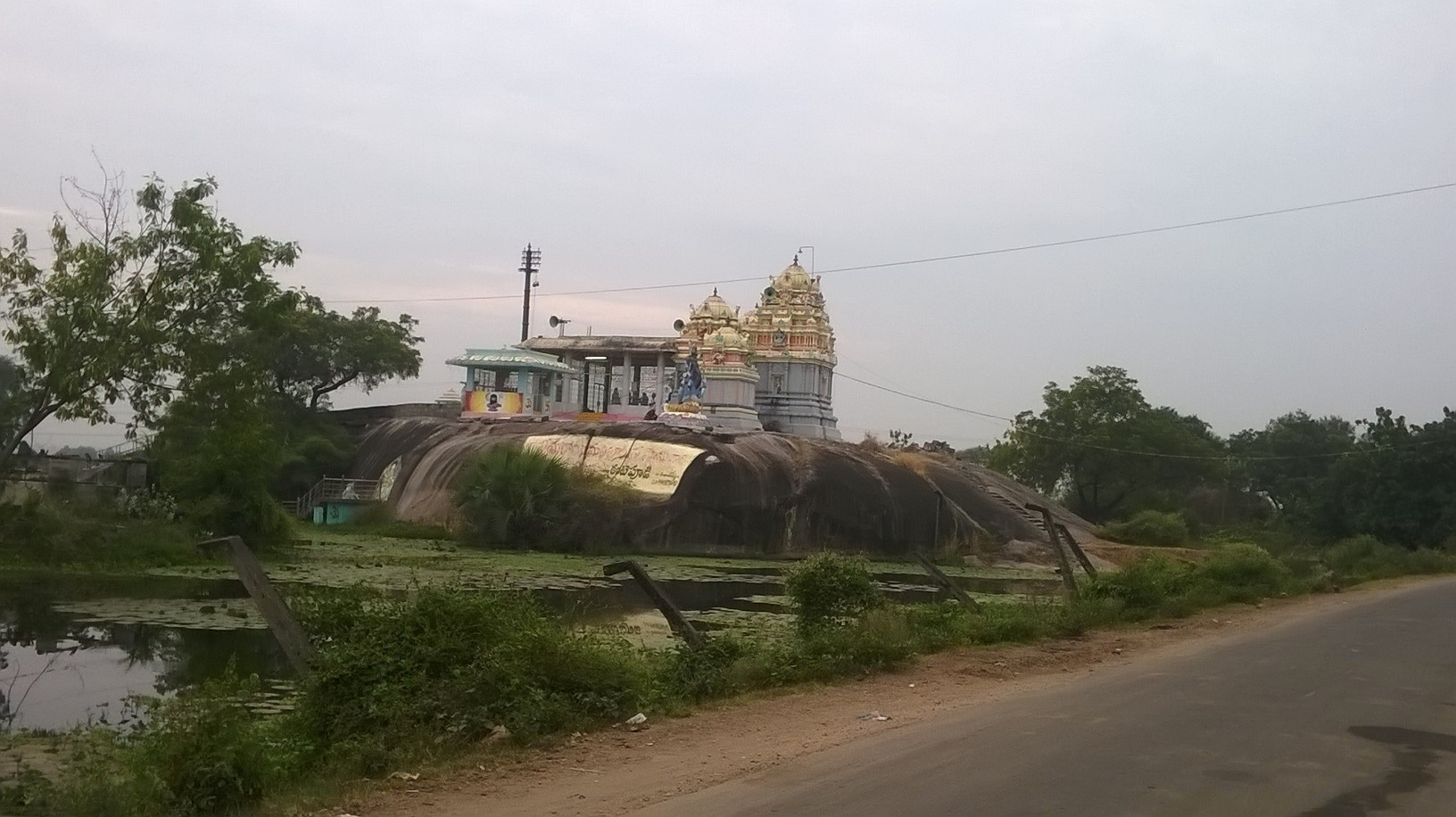 శివాలయం, కంటెపూడి, సత్తెననపల్లి మండలం